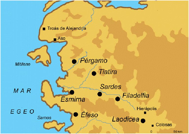 Iglesias